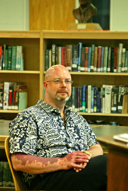 Loselle, Gregory